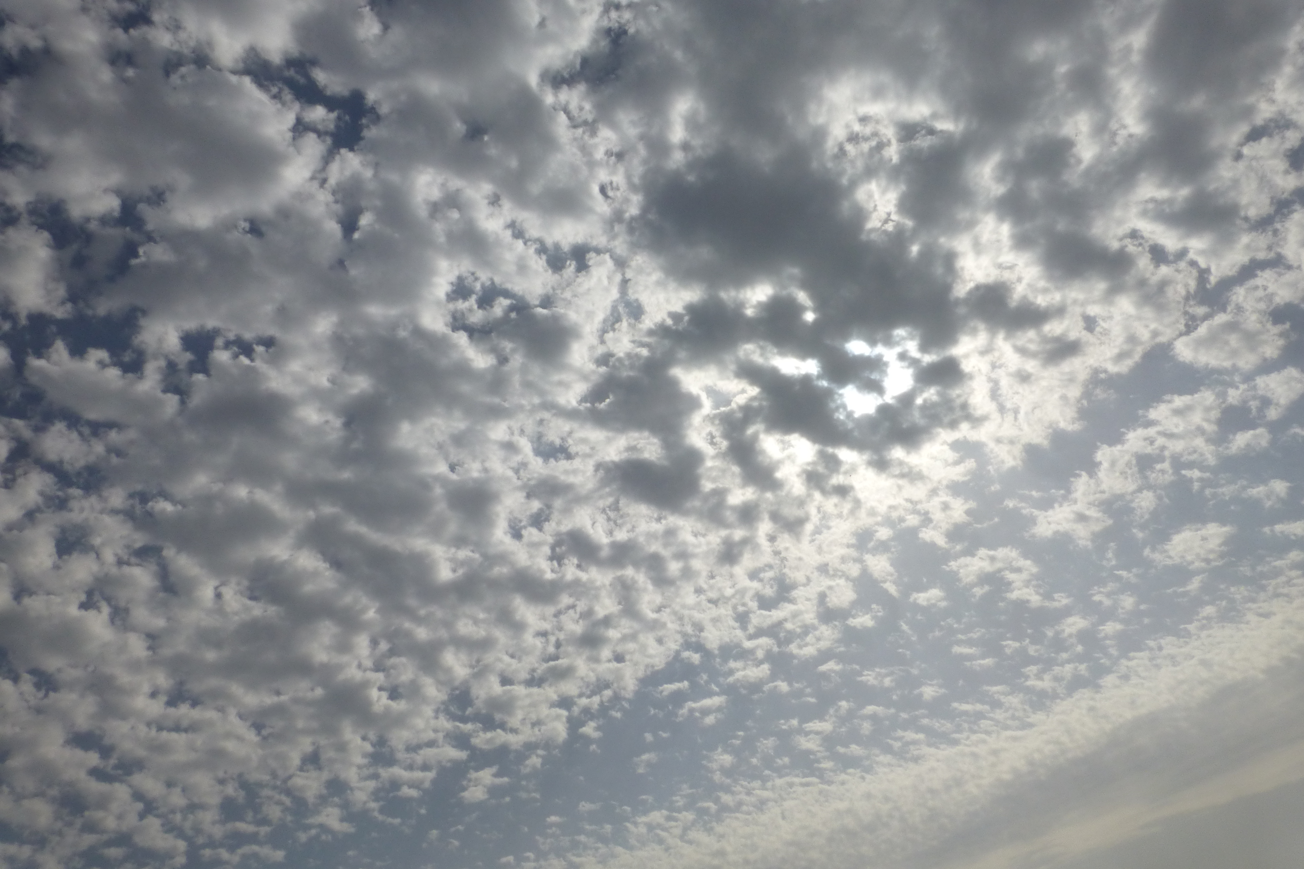 שמורת טבע בעמק זבולון, מזרחית לקריית ביאליק. השמורה כוללת הן את המעיינות והביצות המהווים את מקורו של נחל נעמן והן את האתר הארכאולוגי תל אפק. השמורה הוכרזה ב-1979 והיא משתרעת על פני 660 דונם. ב-1996 הוכרה השמורה כ"אתר רמסר" בהתאם לאמנת רמסר לשימור ולפיתוח בר-קיימא של בתי גידול לחים.